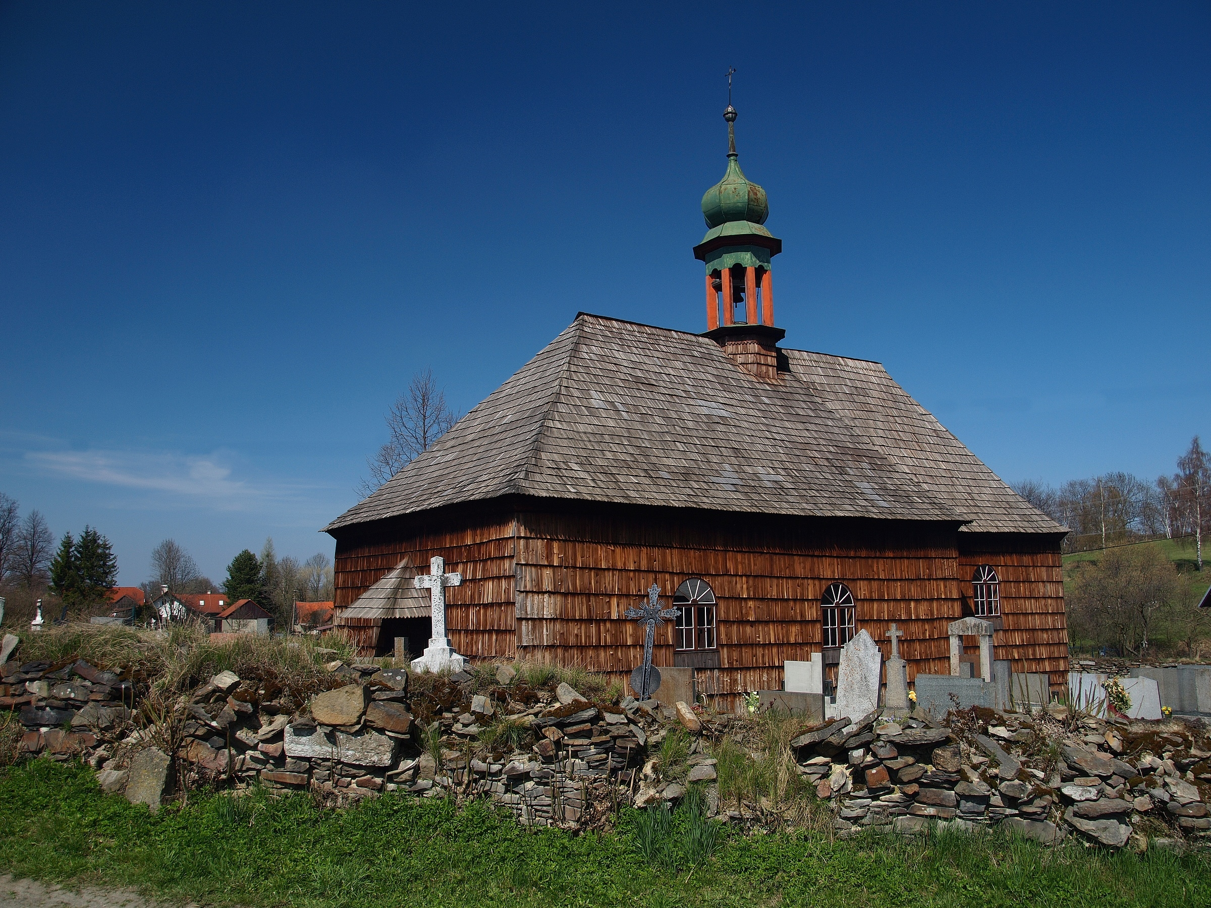 Kostel sv. Jana Křtitele (Lipná), Lipná